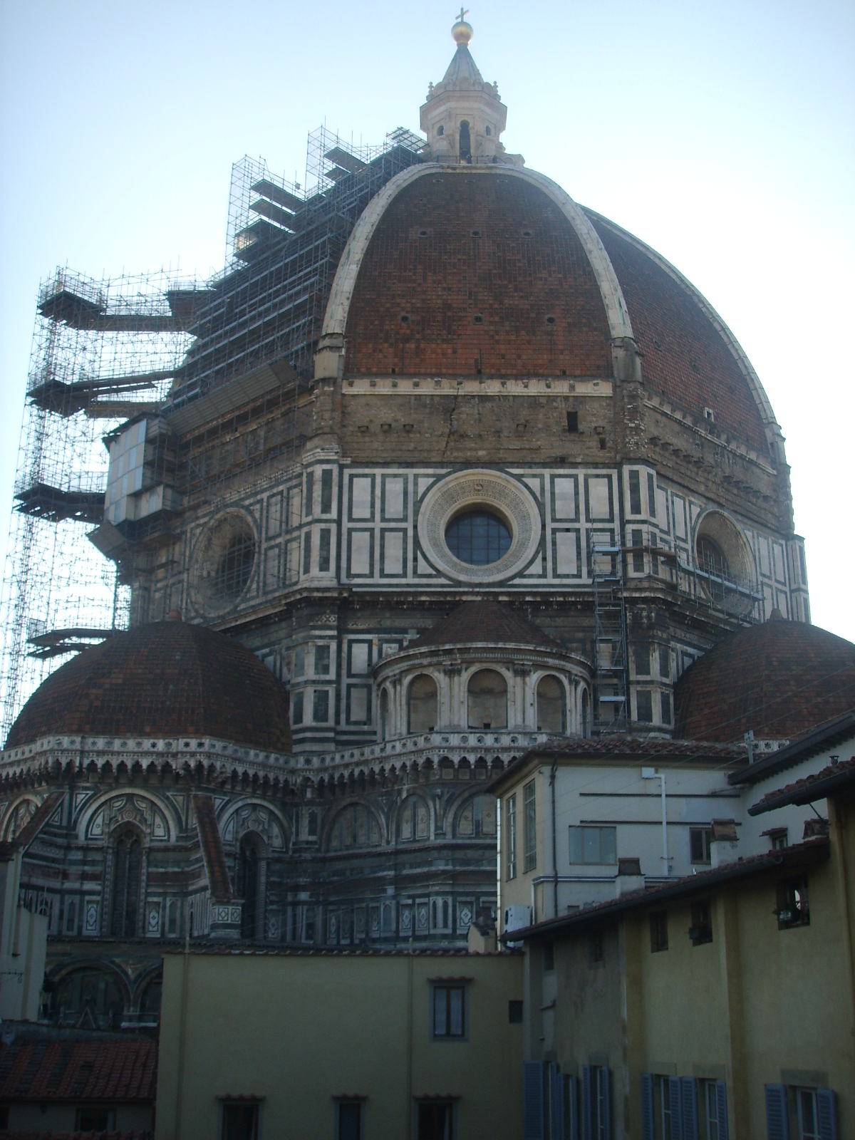 Cupola di Santa Maria del fiore